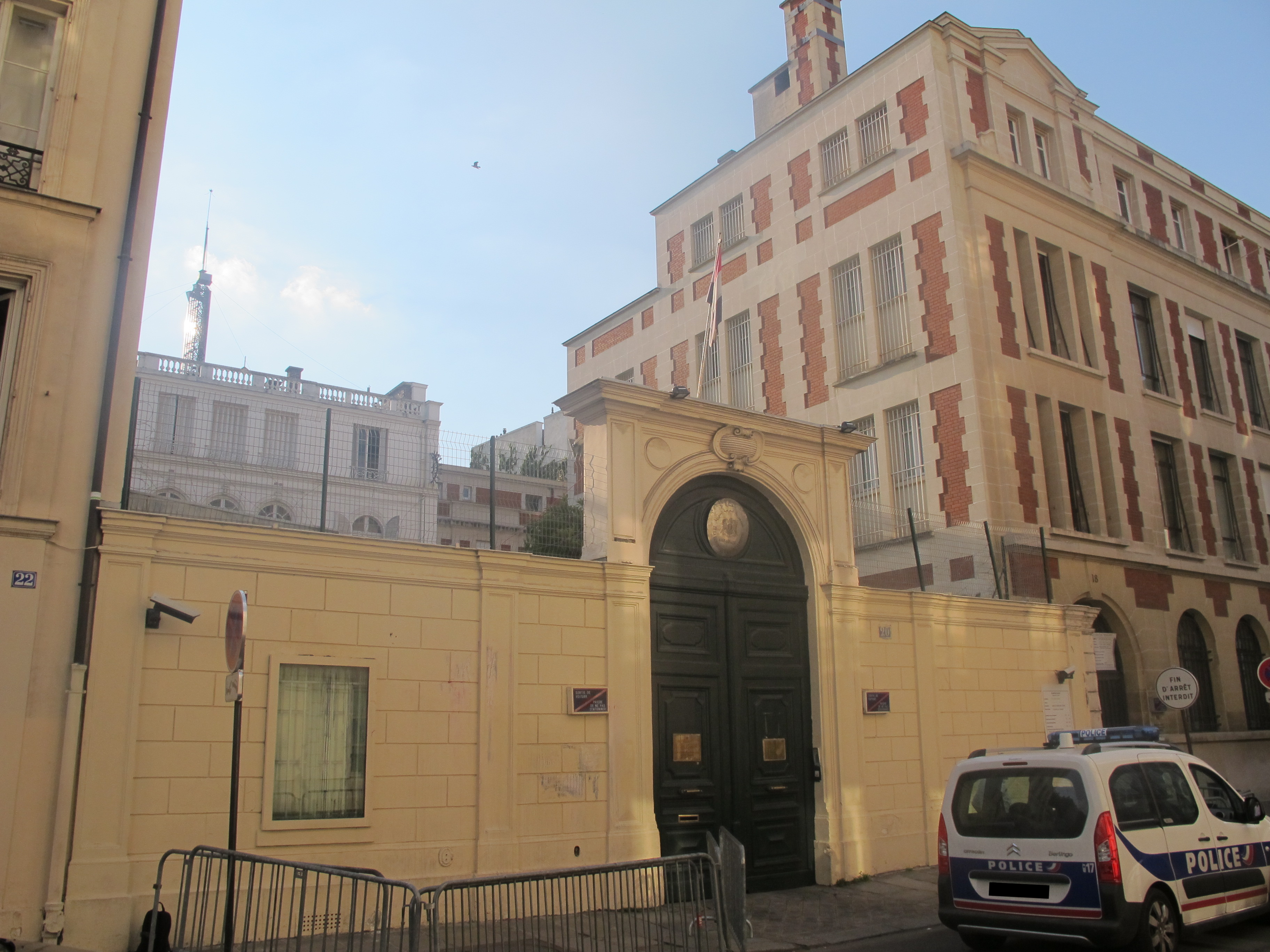 Ambassade de Syrie en France à Paris.